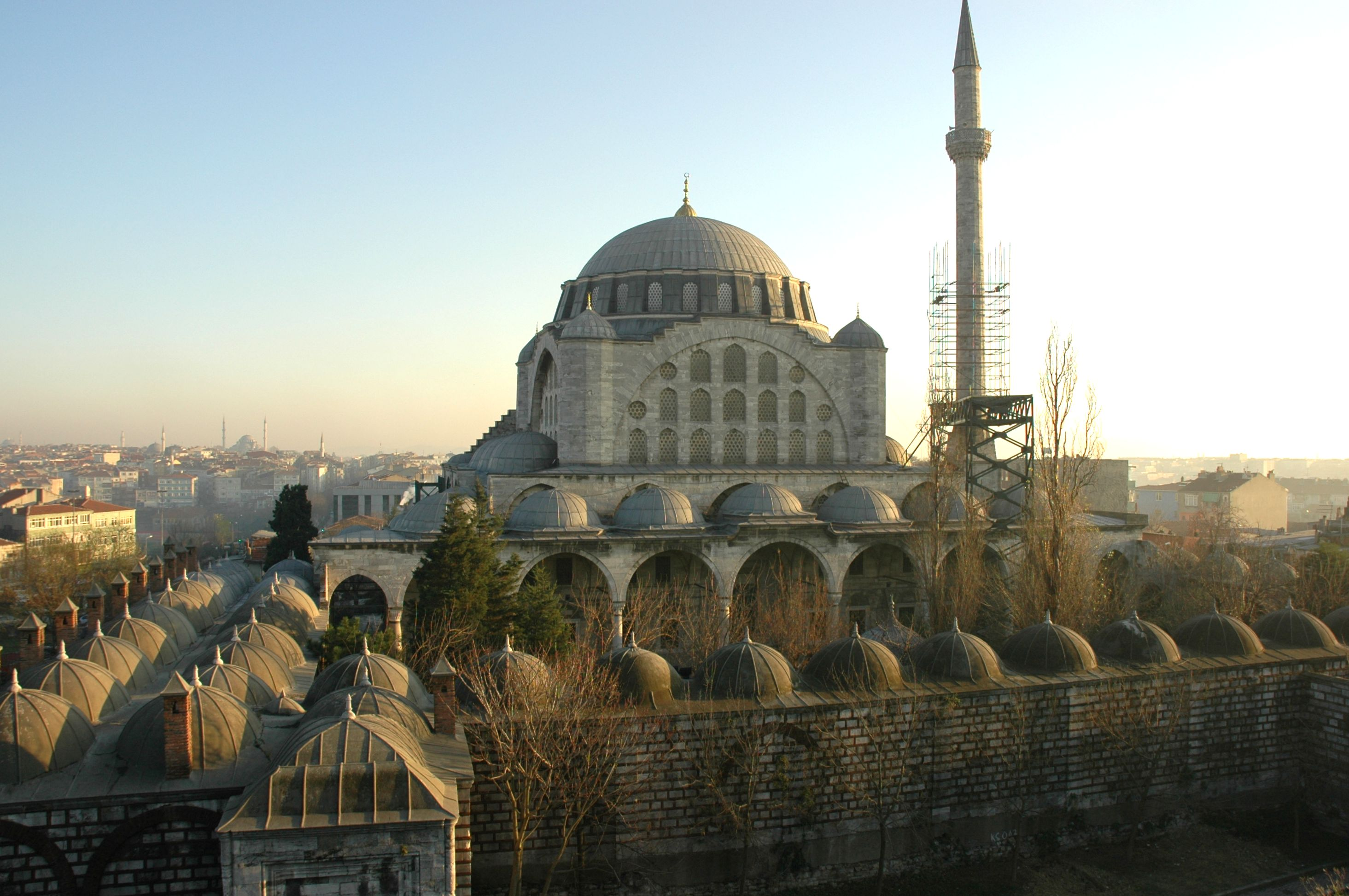 Istanbul - Mesquita de Mihrimah